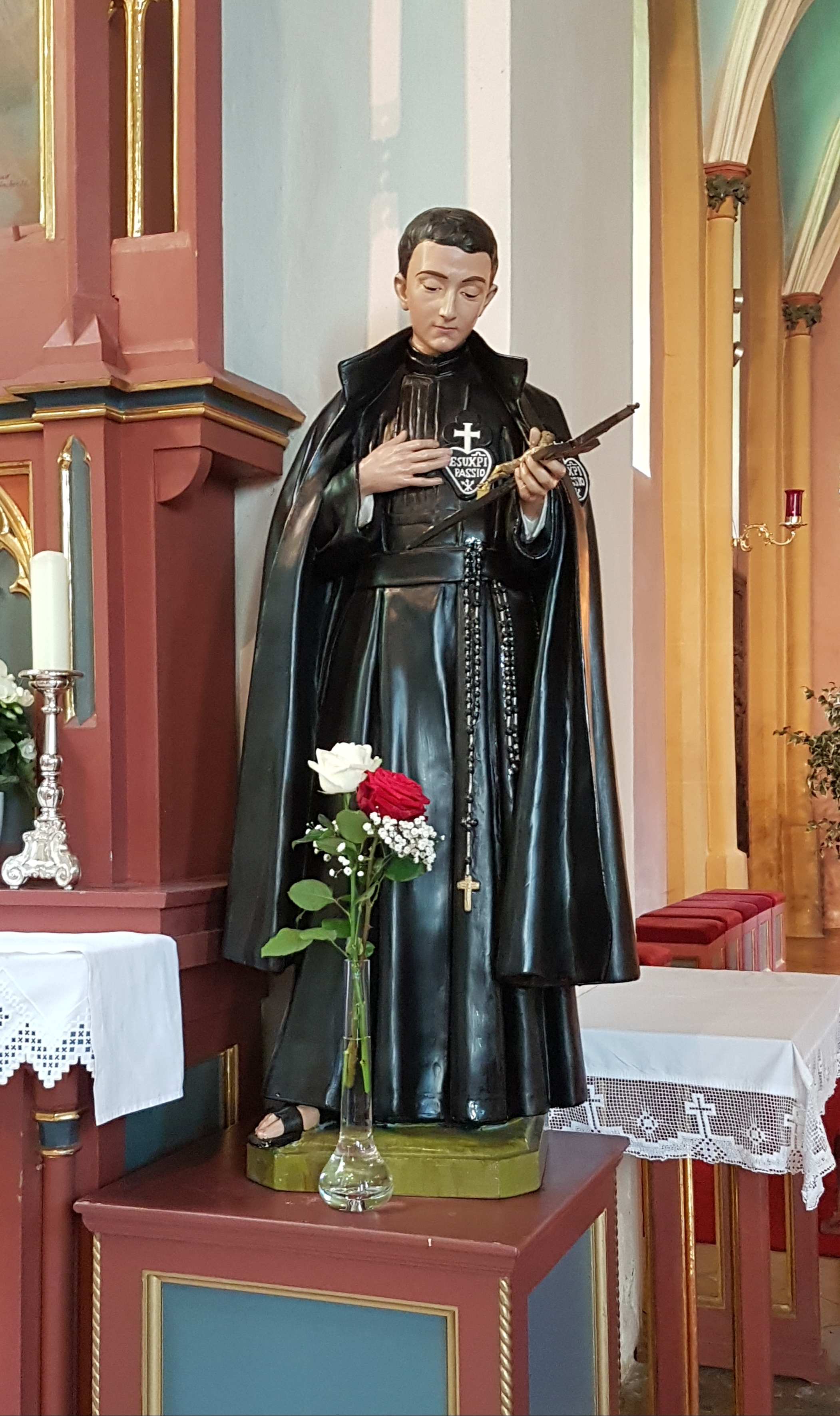 München-Pasing, Mariä Geburt, Hl. Gabriel von der schmerzhaften Muttergottes neben dem linken Seitenaltar